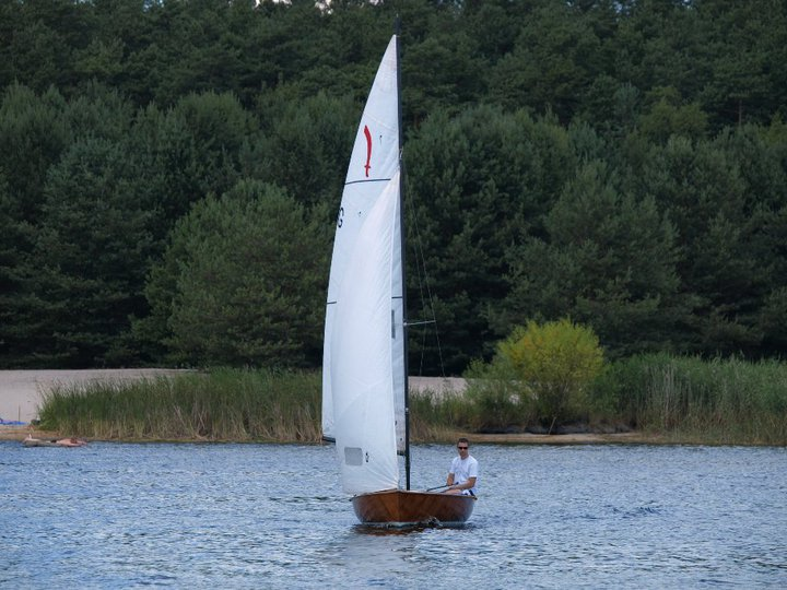 Żaglówka regatowa s/y babs